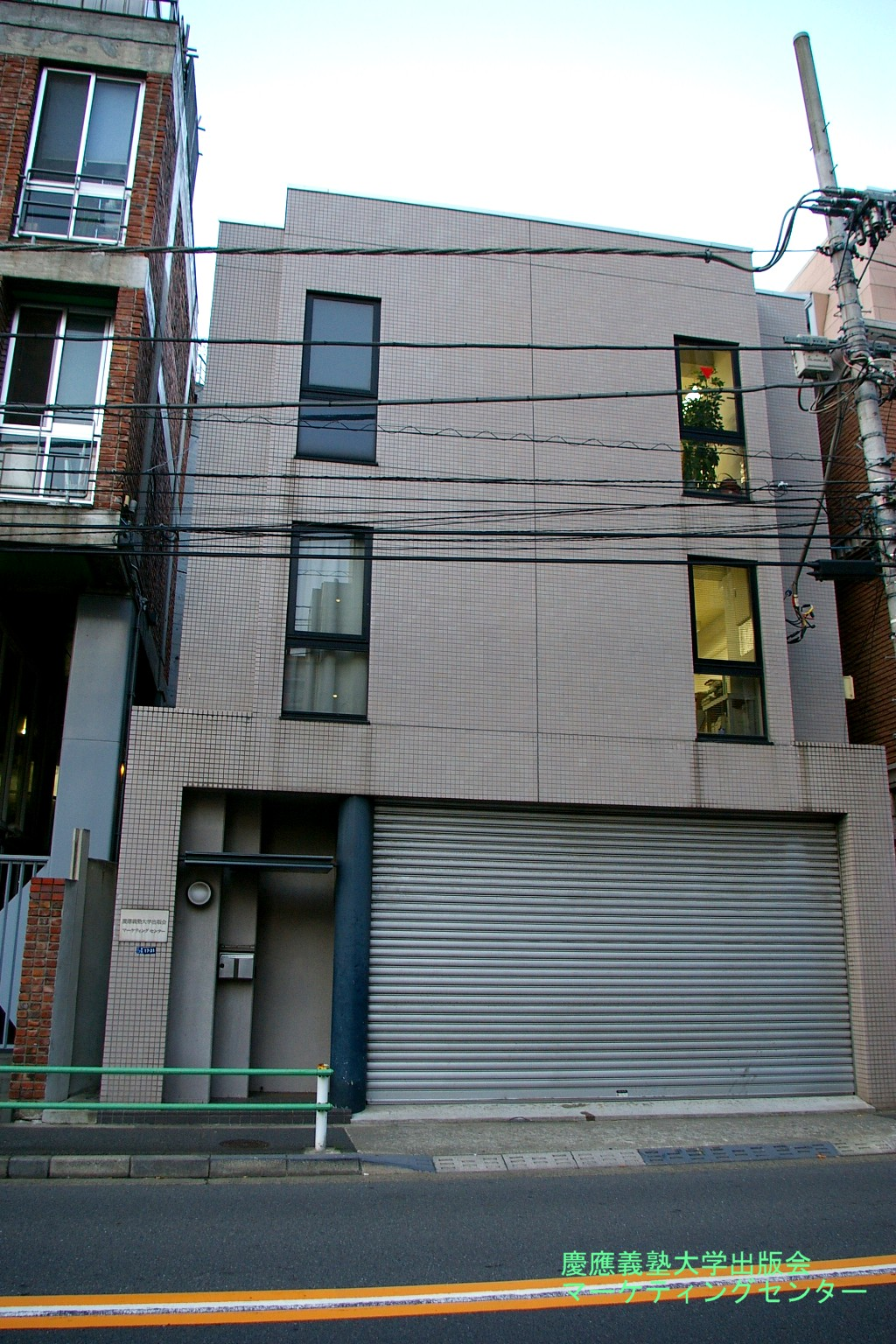 2009.5日本国内で塾生 (talk)が撮影。